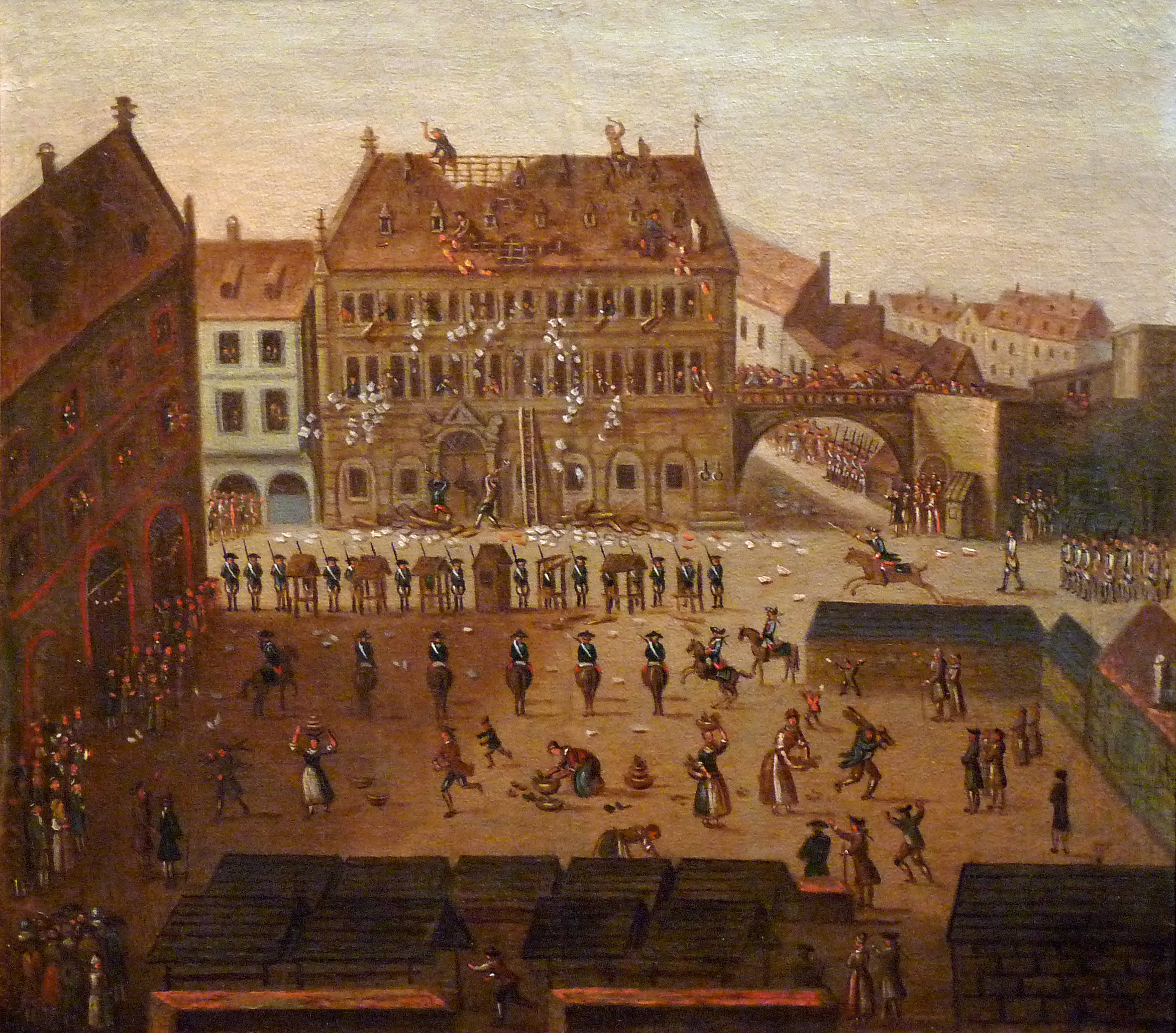 Le sac de l'Hôtel de ville le 21 juillet 1789, huile sur toile, Musée historique de Strasbourg